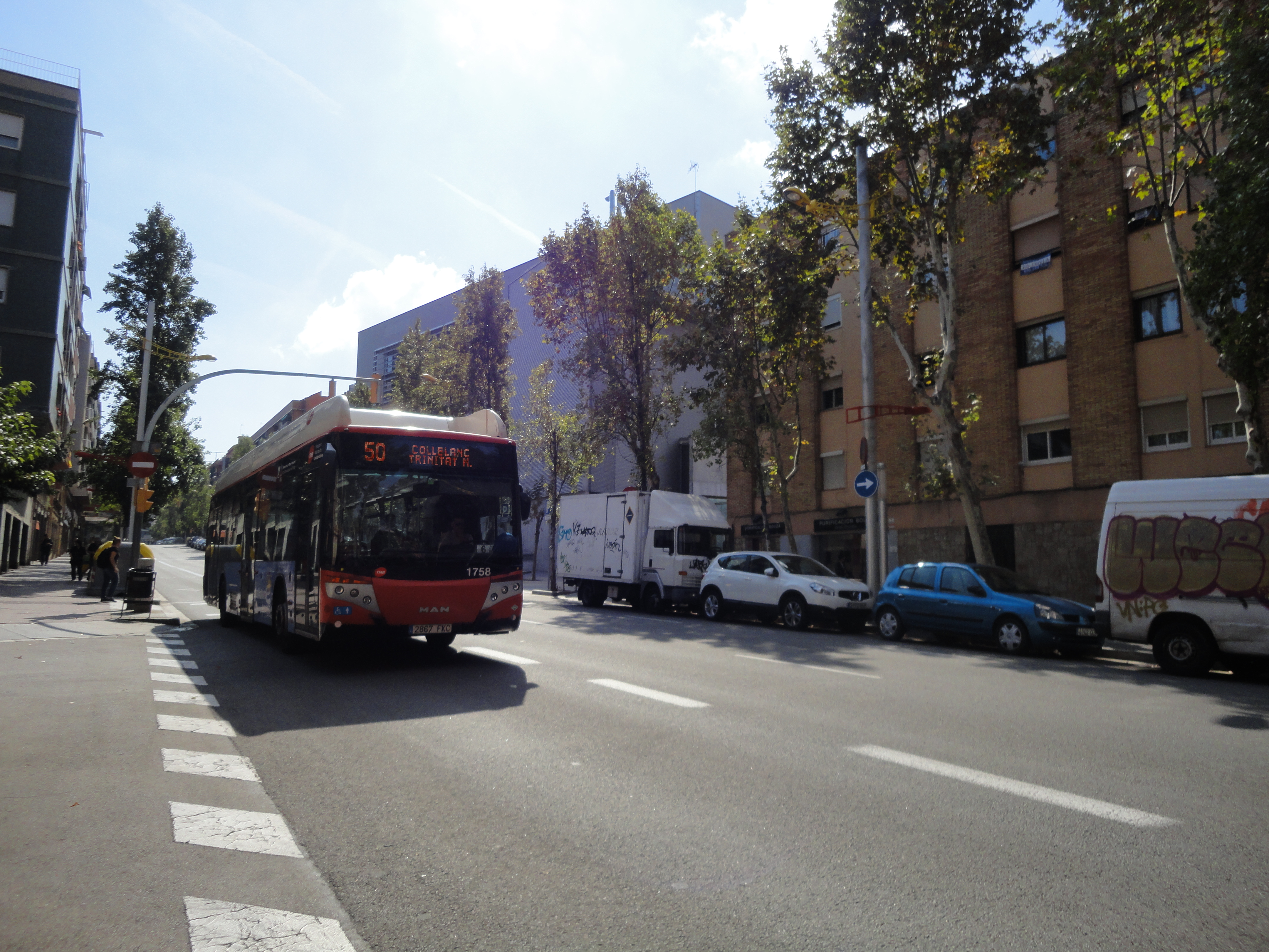 Autobús de Barcelona